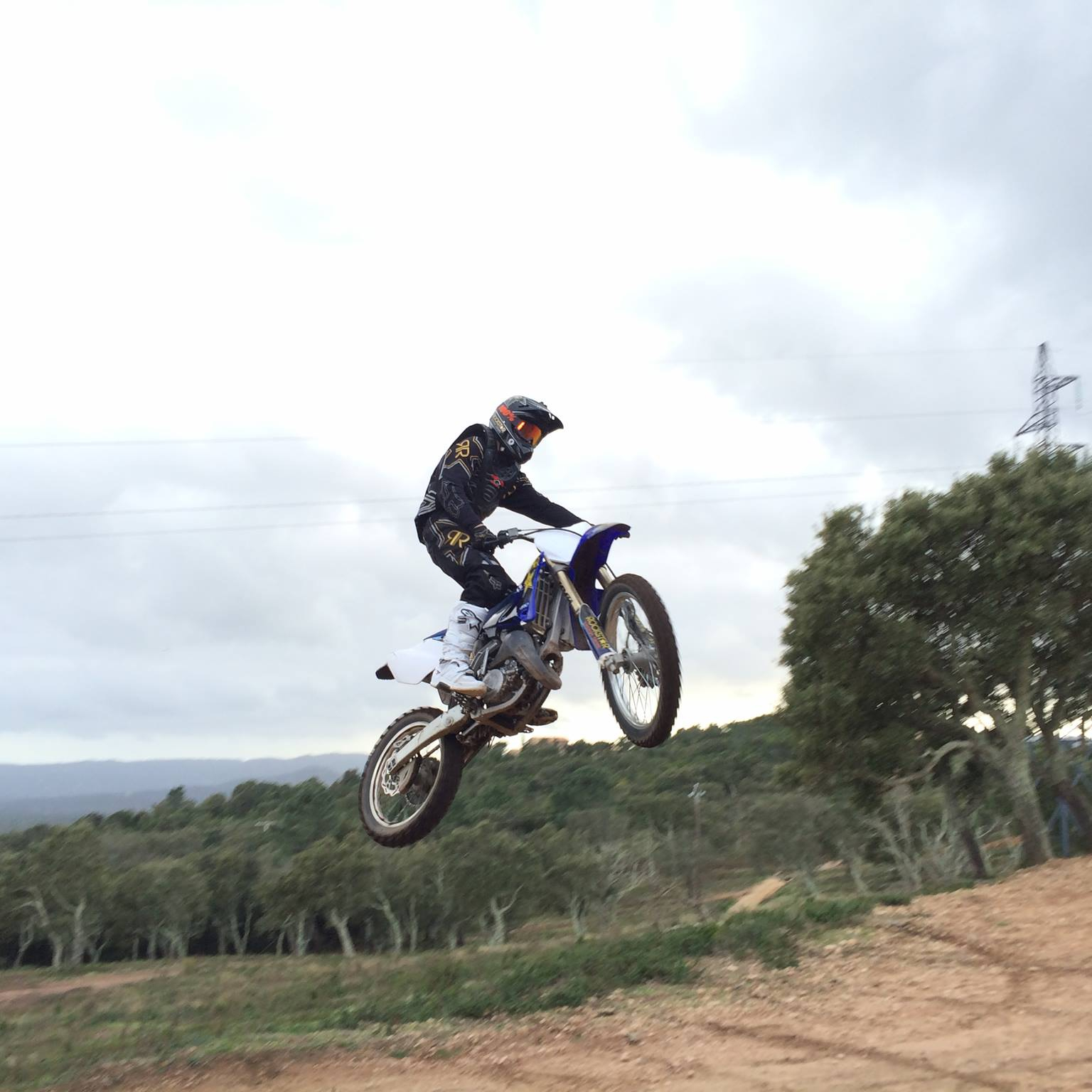 Lucas Tafani en plein saut.